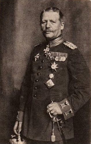 Karl von Einem auf einer Fotografie von Nicola Perscheid